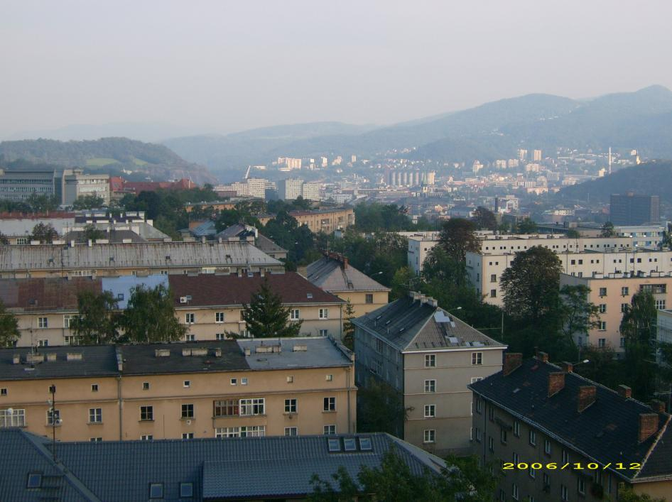 Pohled ke středu města Ústí n. L. z klíšských kolejí.